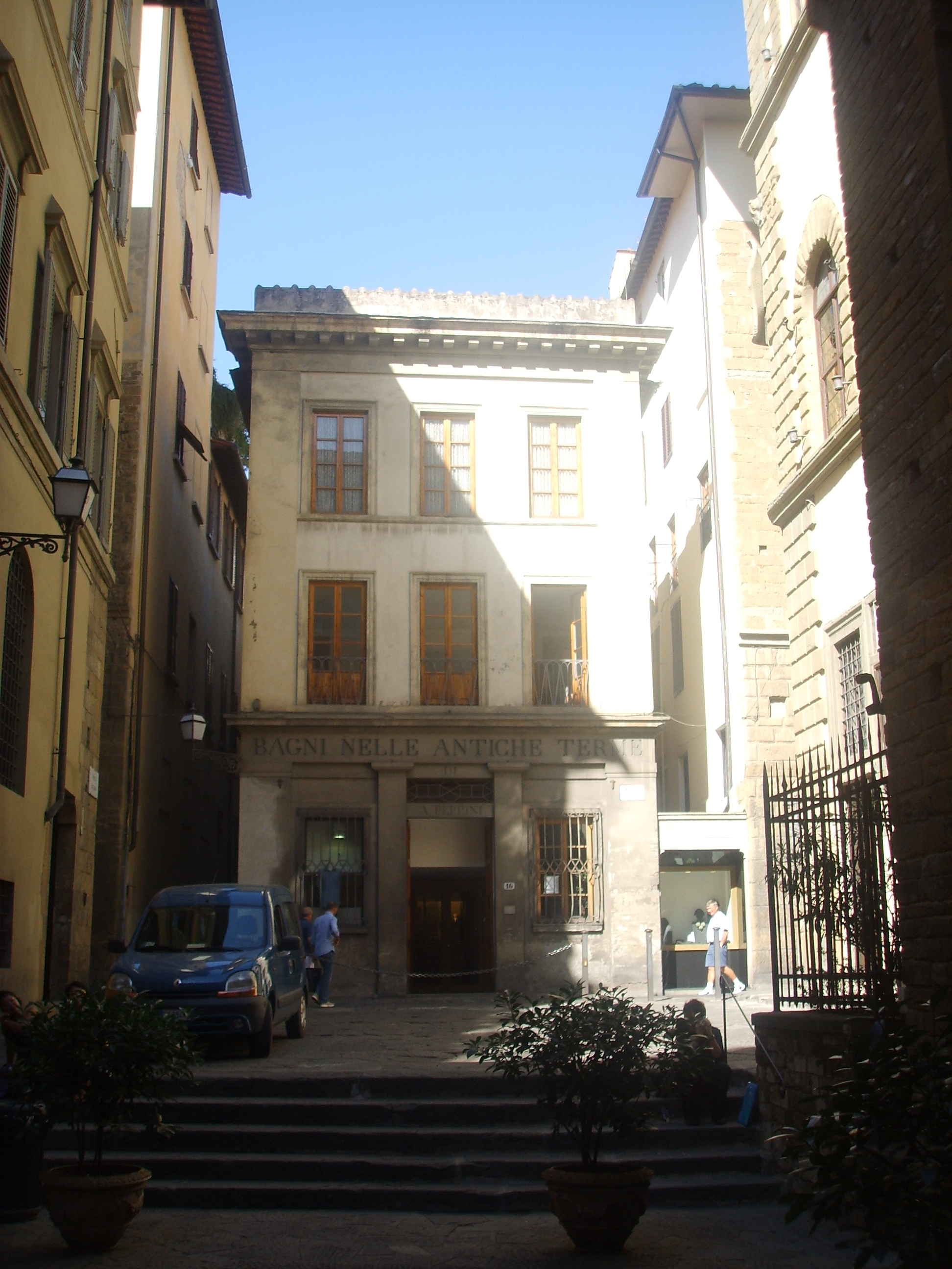 Piazza del Limbo in Florence, italy